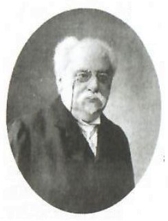 František Levý (1844 -1920), poštovní úředník a regionální historik zabývající se Rakovnickem a Přerovskem